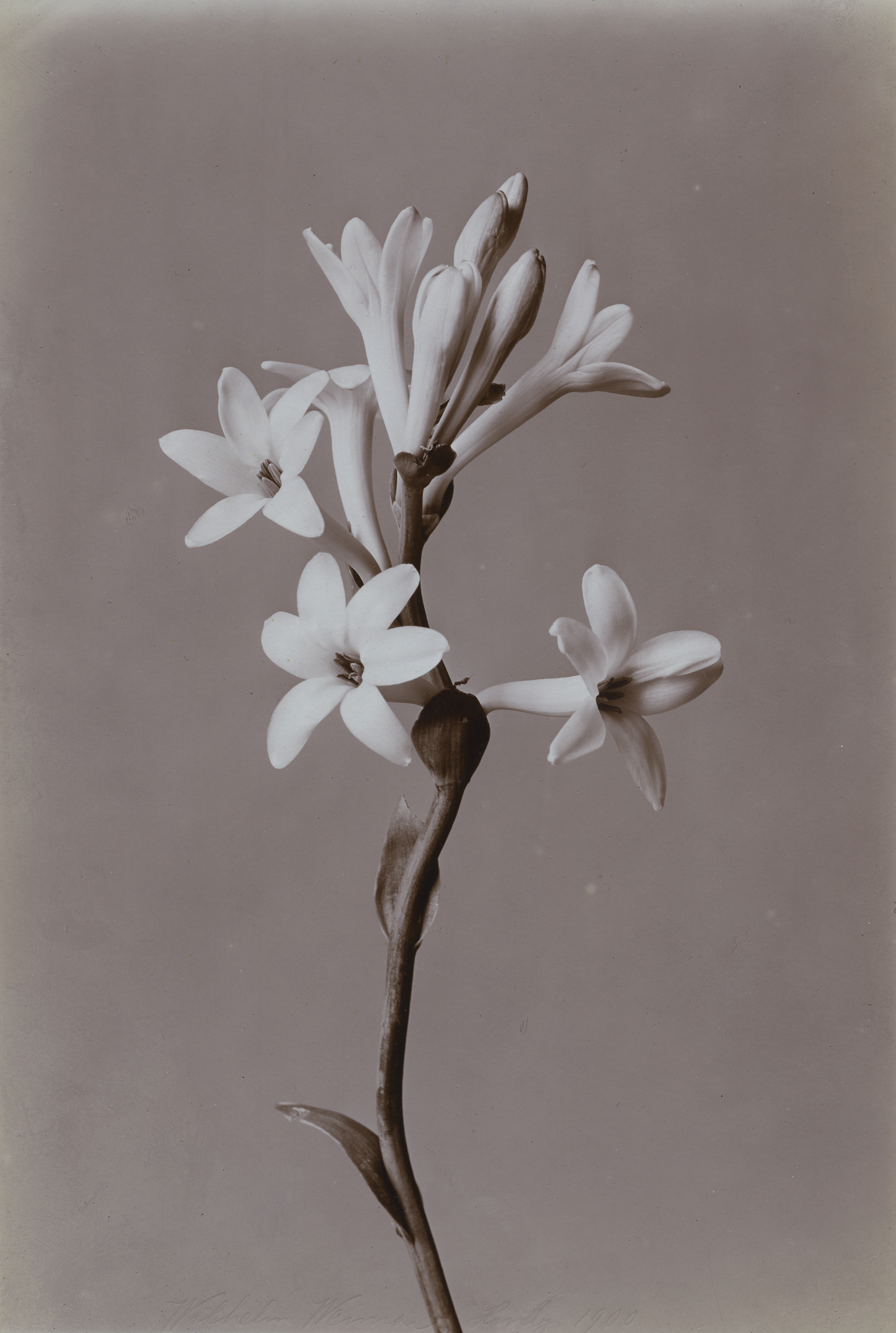 Foto Tuberose für das fotografische Herbarium des Museums für Kunst und Gewerbe Hamburg